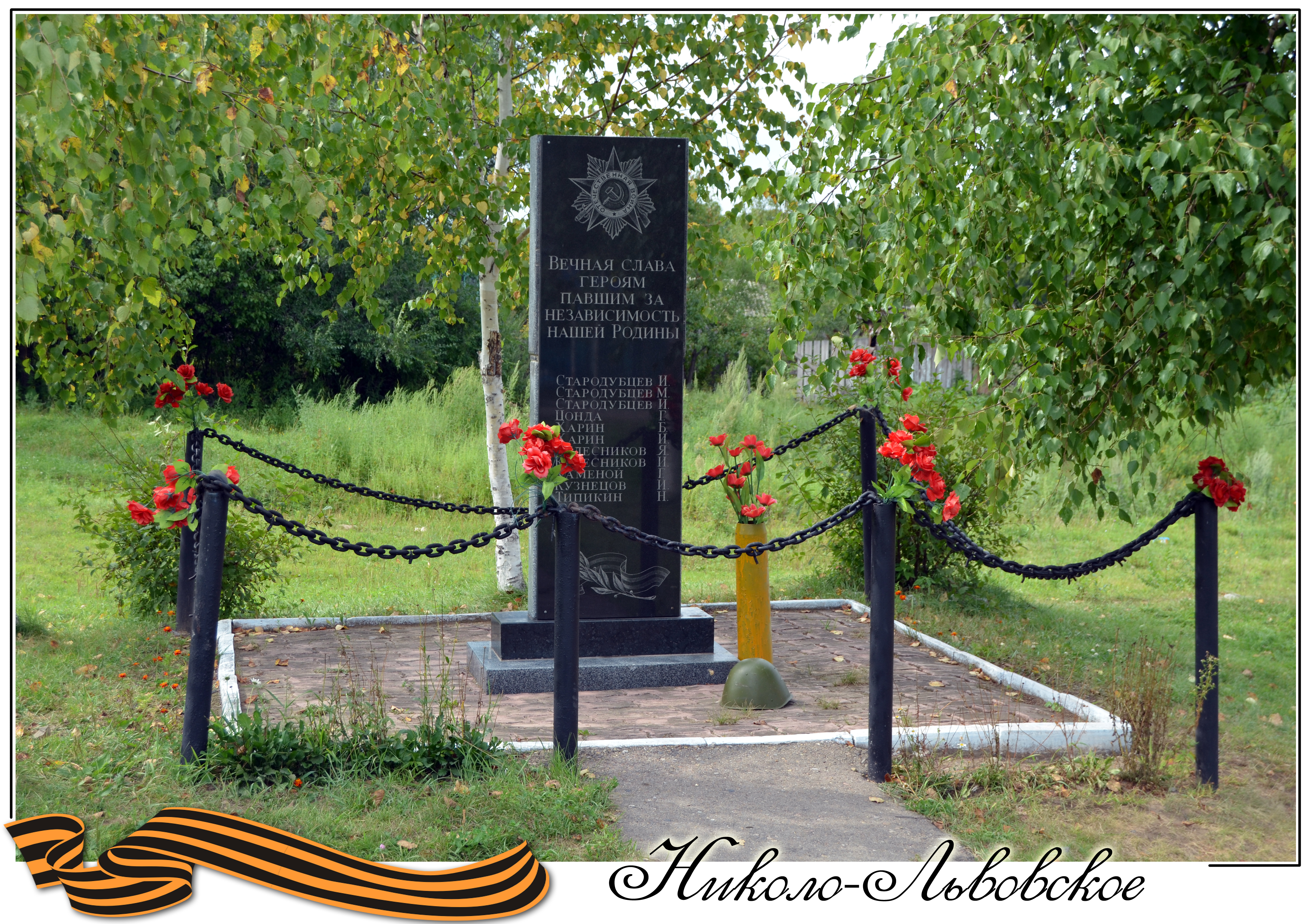 Памятник односельчанам, погибшим в годы Великой Отечественной войны 1941-1945.